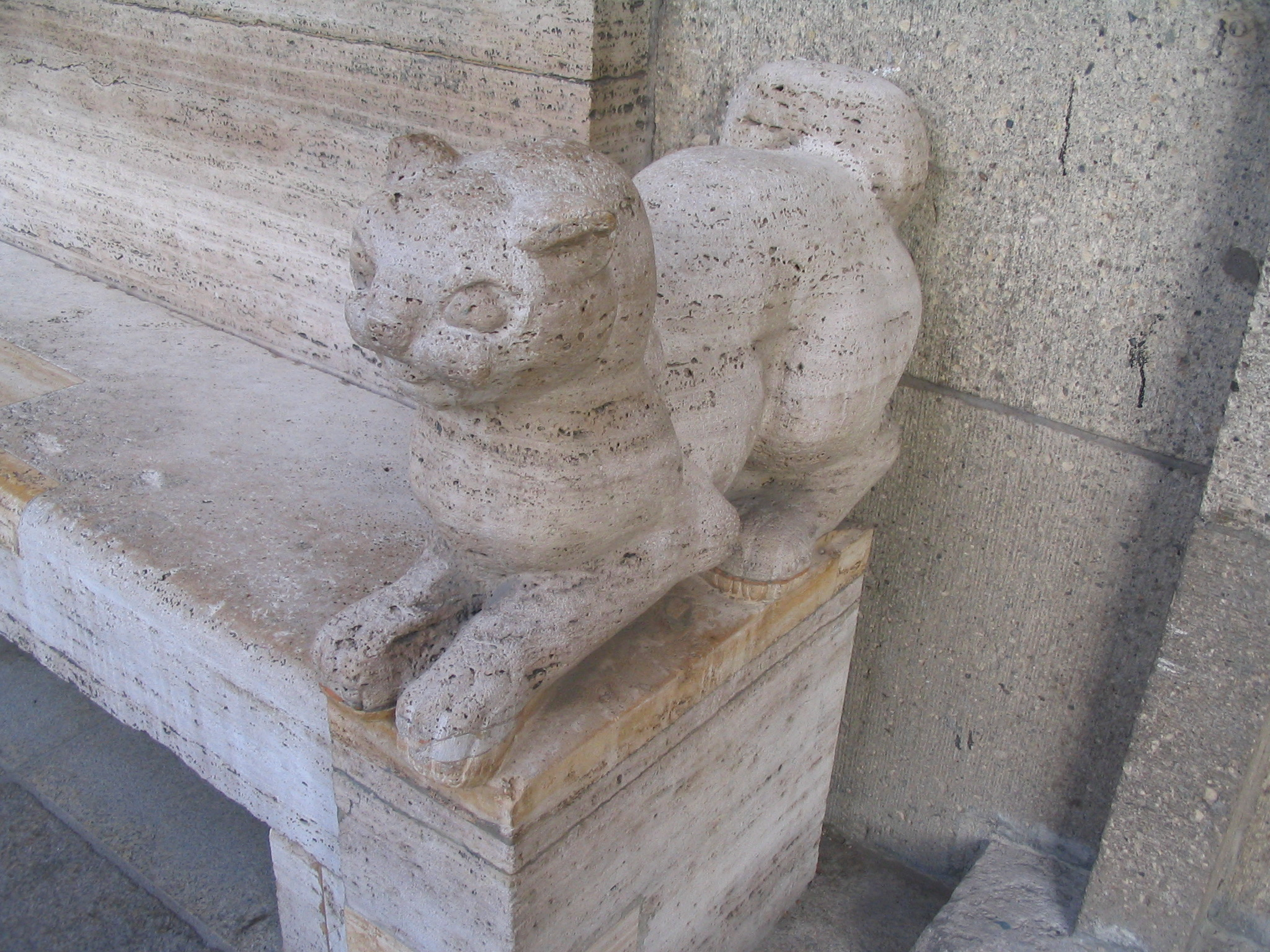 Carl-Moritz Schreiner, 2 Bänke (die linke Bank) neben dem Osteingang des Museum Kunstpalast, Ehrenhof, Robert-Schumann-Saal.